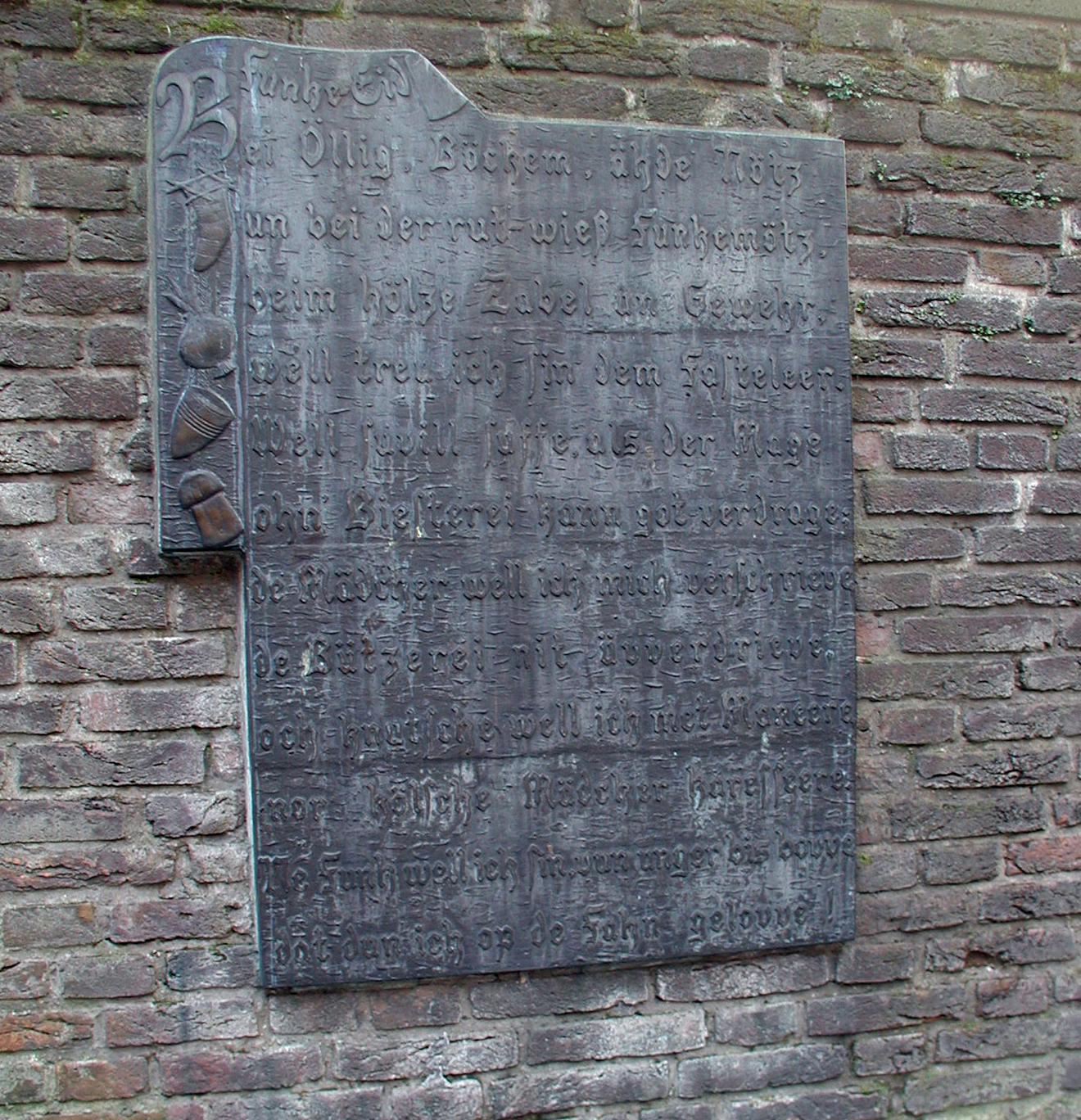 Köln-Altstadt, der Rote Funkeneid